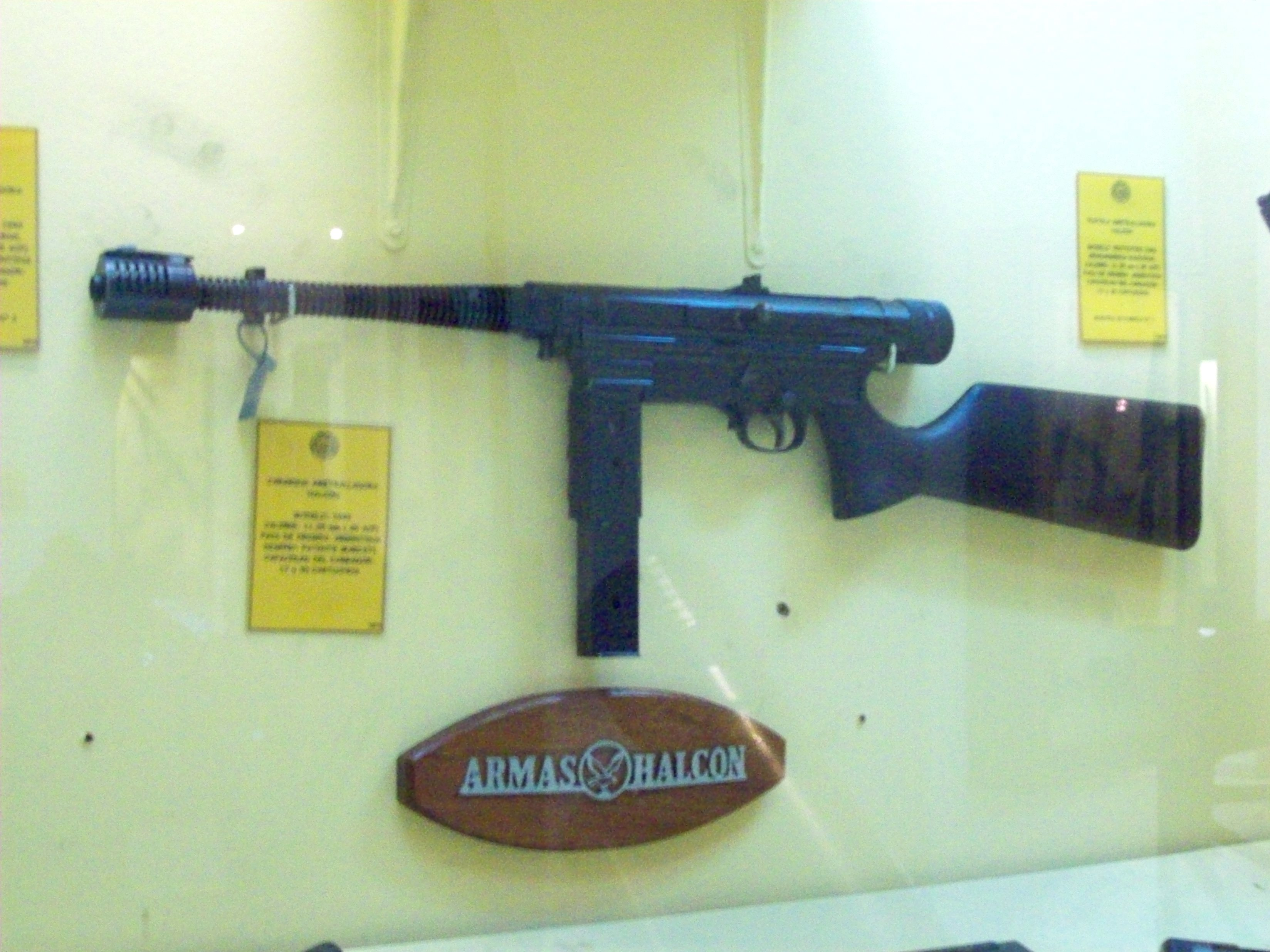 Armamento expuesto en el Museo de Armas de la Nación, ciudad de Buenos Aires, Argentina 2014.